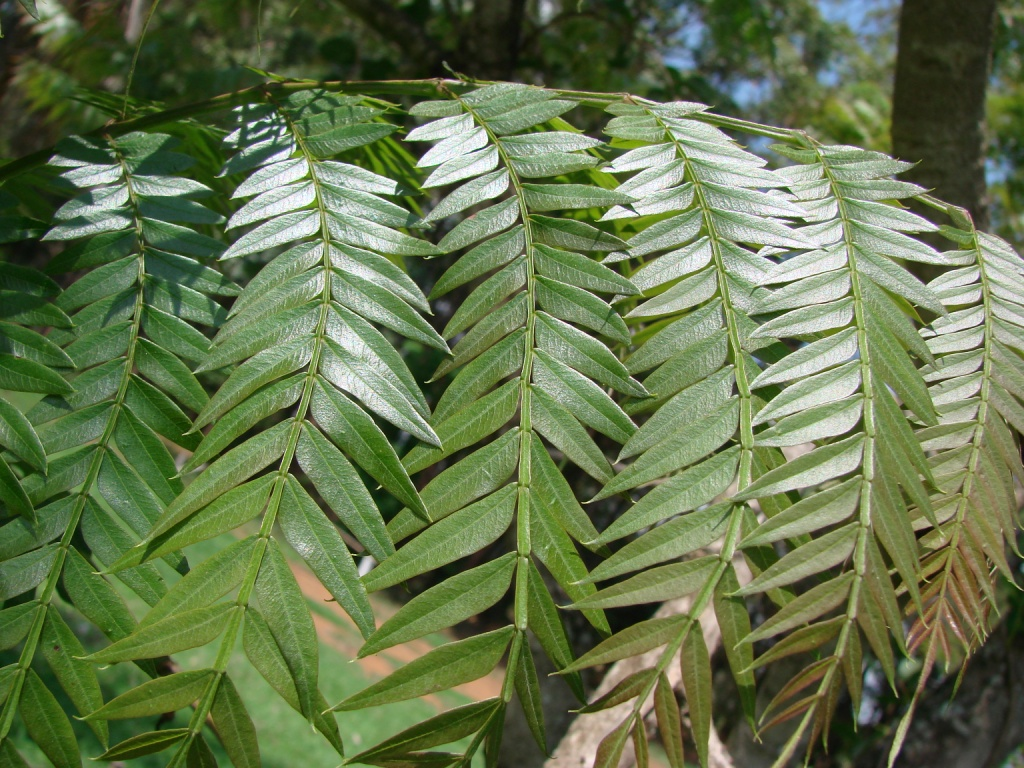 Jacaranda cuspidifolia (= Jacaranda chapadensis) - BIGNONIACEAE Jardim Botânico de Brasília - Distrito Federal - Brasil.